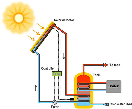 ابگرم کن خورشیدی